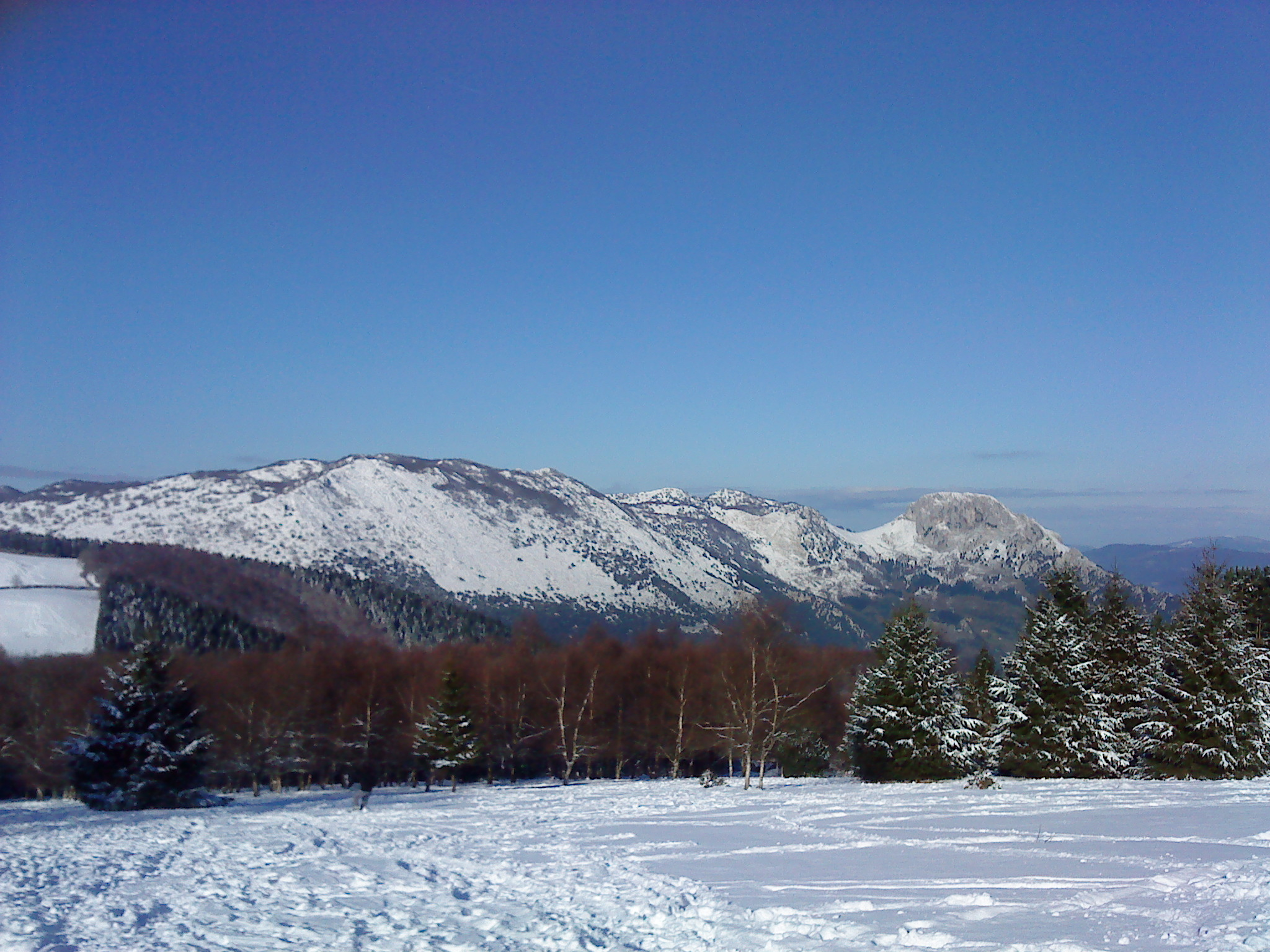 Parque natural de Urkiola, macizo de Eskubaratz y monte Mugarra. Bizkaia, País Vasco (España).